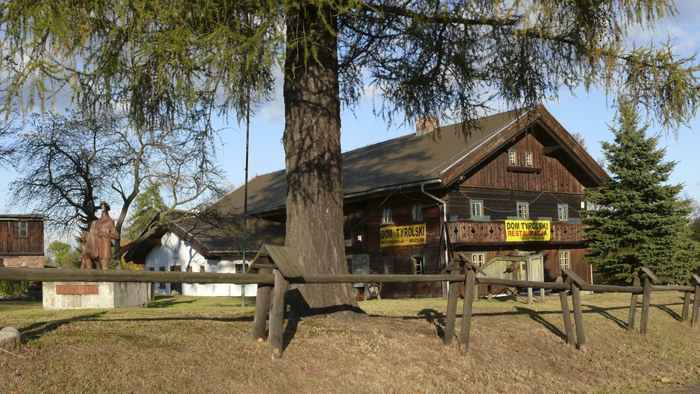 Mysłakowice, ul. Starowiejska 14 - budynek mieszkalno-gospodarczy, obecnie restauracja i muzeum z pomnikiem Tyrolczyków na dziedzińcu (zabytek nr 1025/J z dn. 30.03.1990)